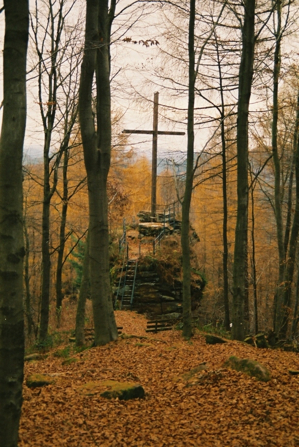 Petersbächel, Friedenskreuz auf dem Maimont im Herbst